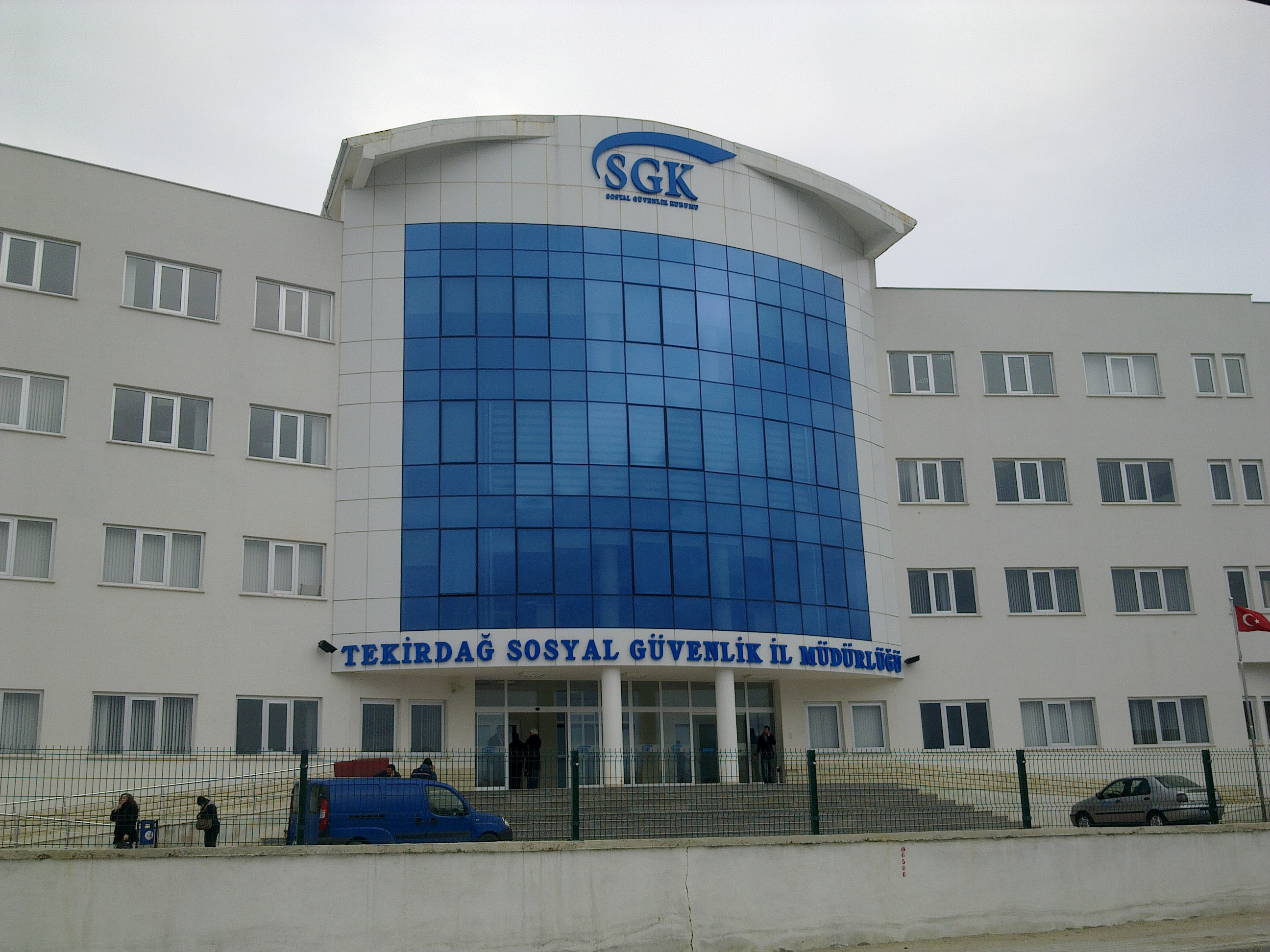 TEKİRDAĞ SOSYAL GÜVENLİK İL MÜDÜRLÜĞÜ